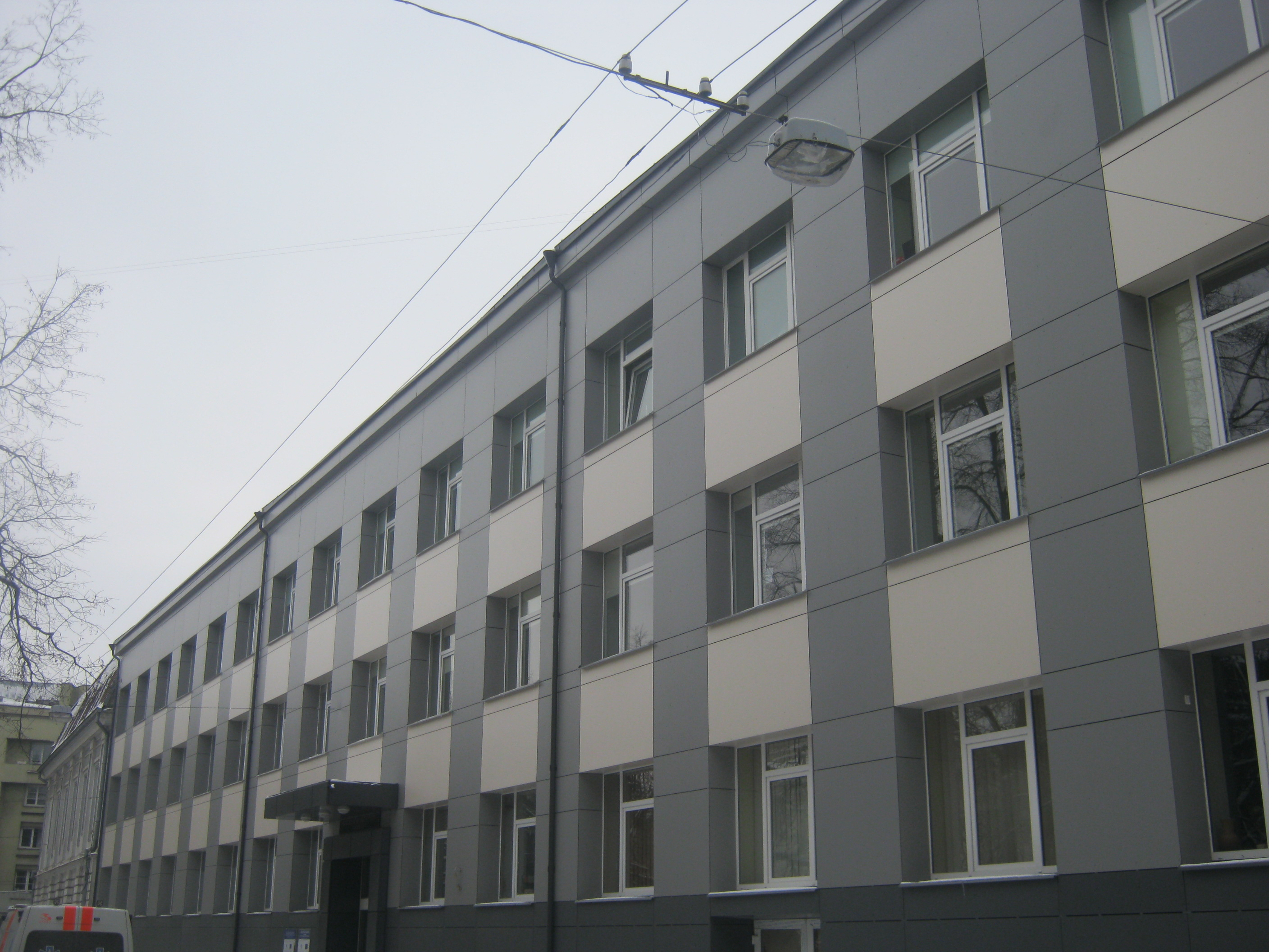 Mykolo Marcinkevičiaus ligoninė, Kauno g. 7, Vilnius